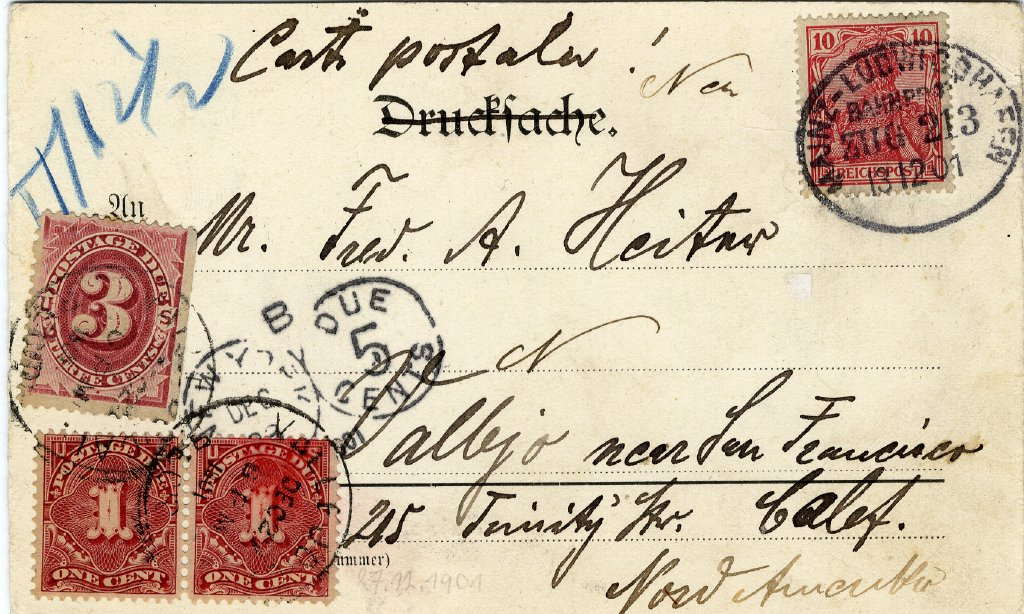 Das Porto für diese Karte betrug 20 Pfennige, für die fehlenden 10 Pf. wurden vom Empfänger 5 Cent nacherhoben